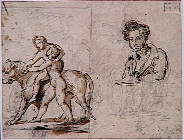 Théodore Géricault (1791-1824), französischer Maler. Selbstporträt (rechts) mit Studie eines Löwen.